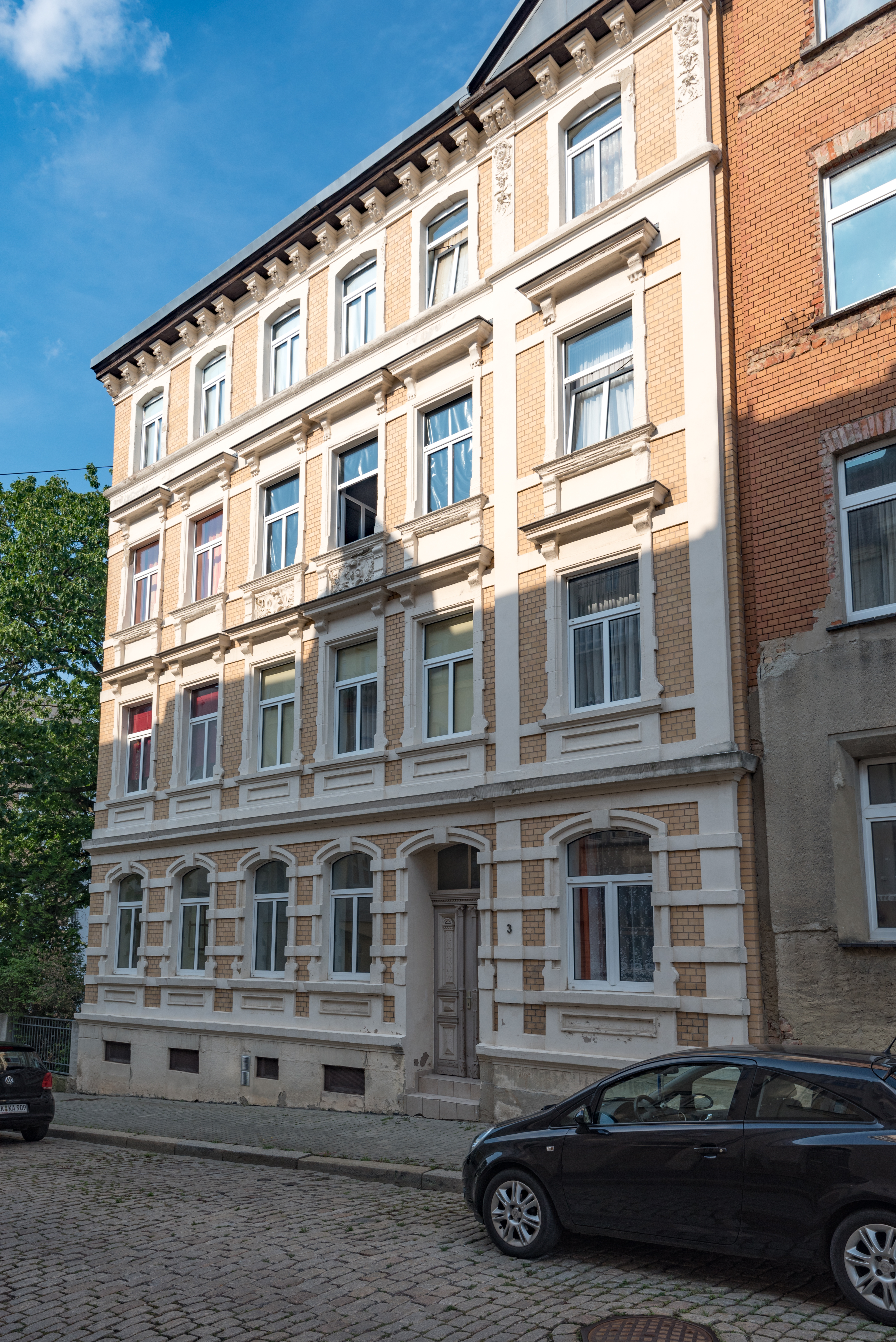 Zeitz, Einsteinstraße 3